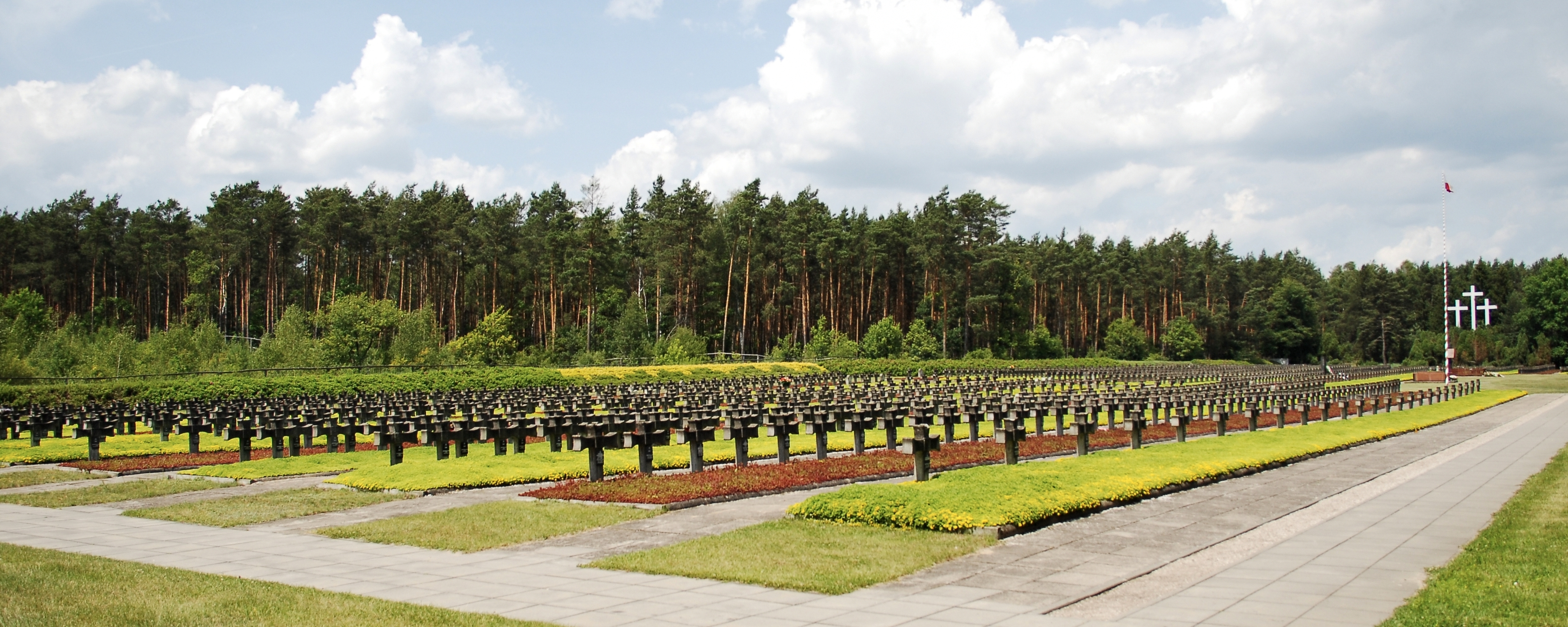 Cmentarz w Palmirach - panorama